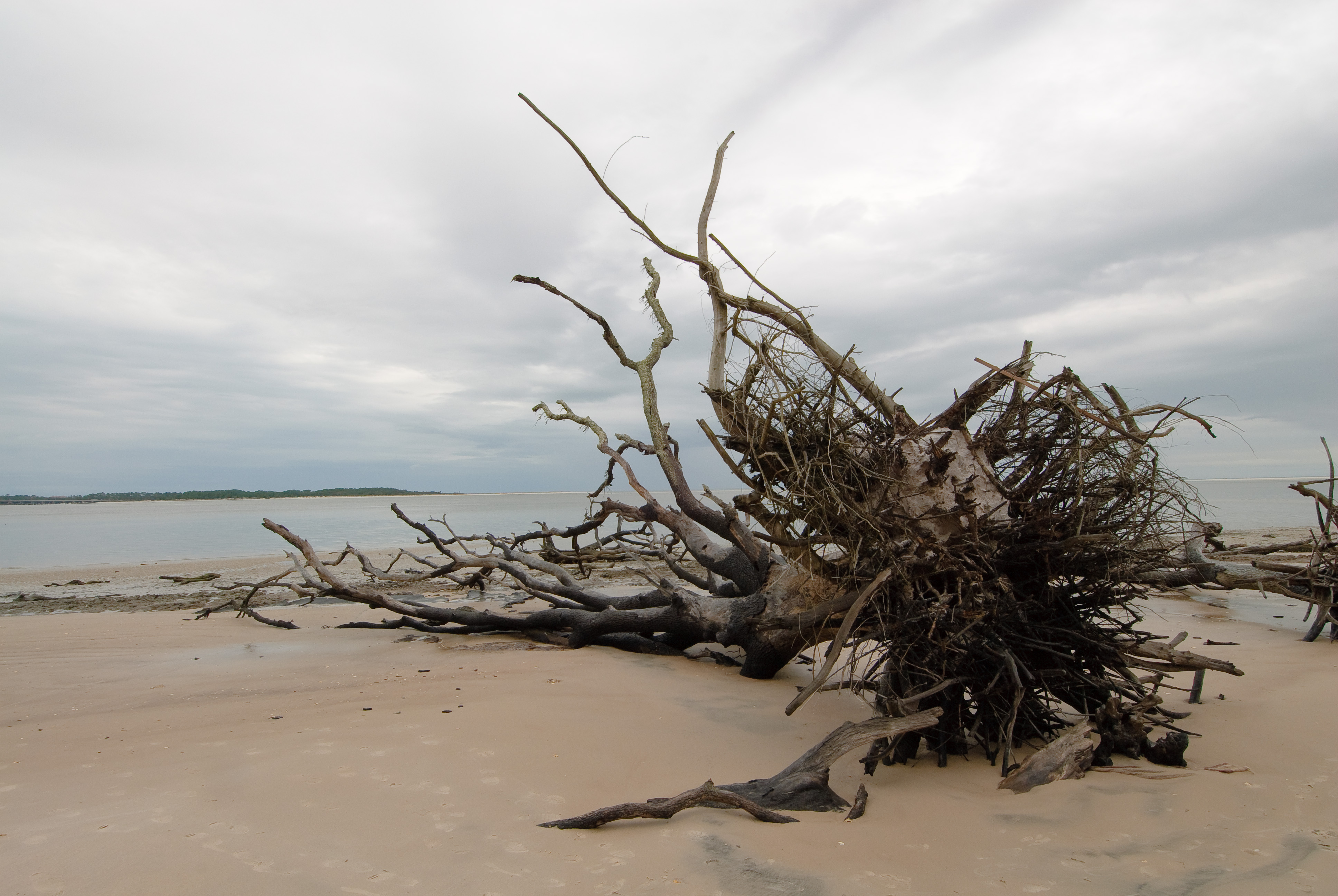 sinking